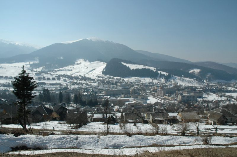 view on Volovets in winter